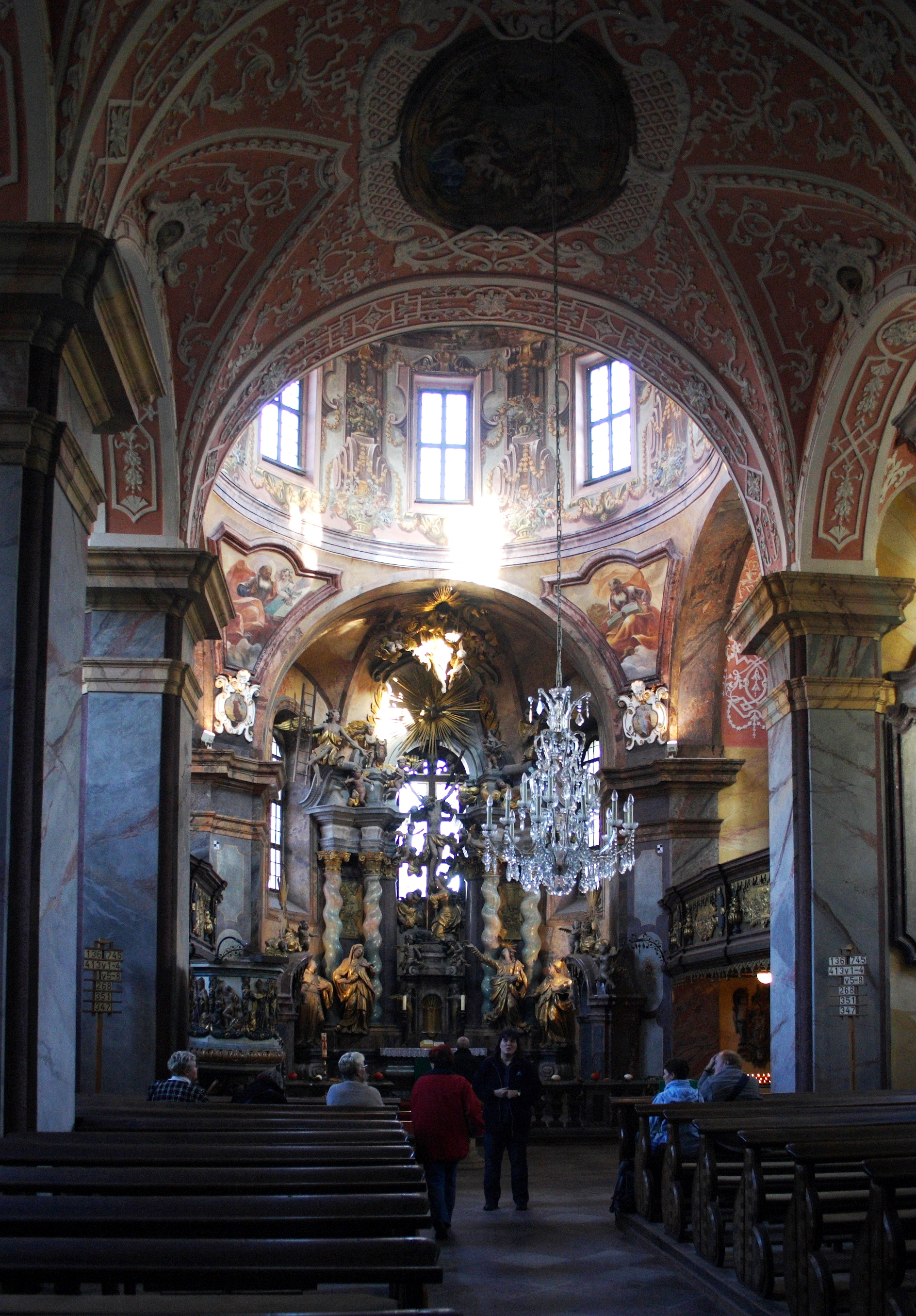 Neuzelle, evangelische Heilig-Kreuz-Kirche, Innenraum